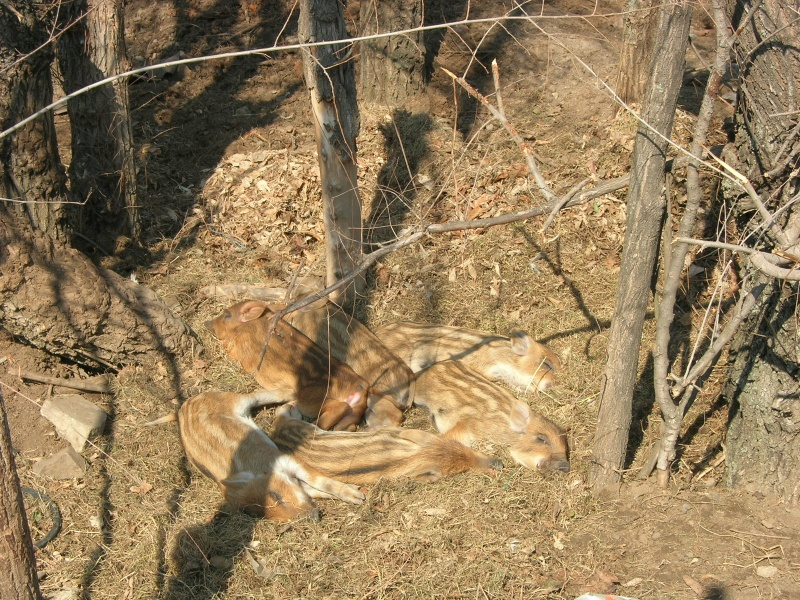 Поросята в Чернышковском районе.